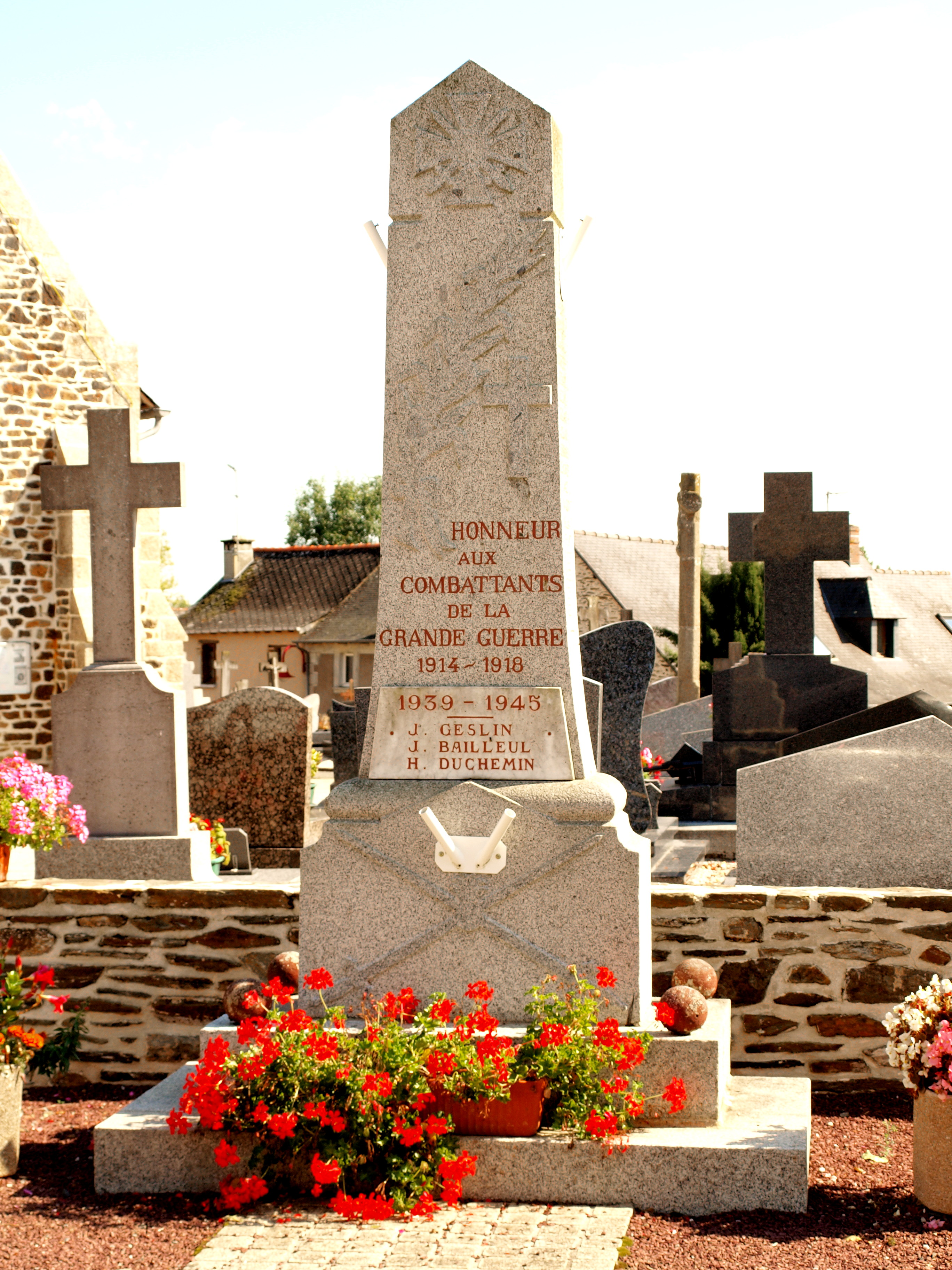 Cornillé (Ille-et-Vilaine ; France) monument aux morts